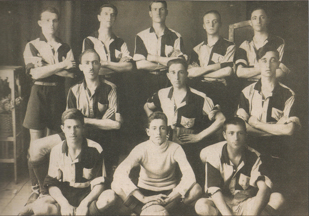 Η ομάδα του Άρη το 1923